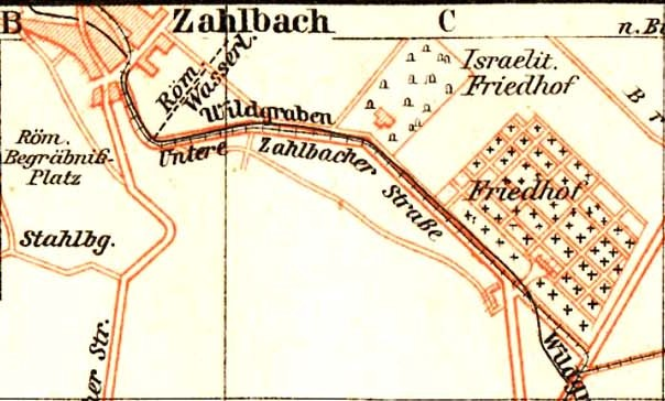 Stadtplan (Umgebung) von Mainz, hier Mainz-Zahlbach, mit den beiden Friedhöfen (jüdischer und Hauptfriedhof (Mainz)